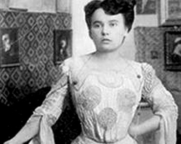 Cecilia Cuțescu-Storck (n. 14 martie 1879, Câineni, Vâlcea - d. 1969, București). Portret realizat de catre soţul ei Frederic Storck